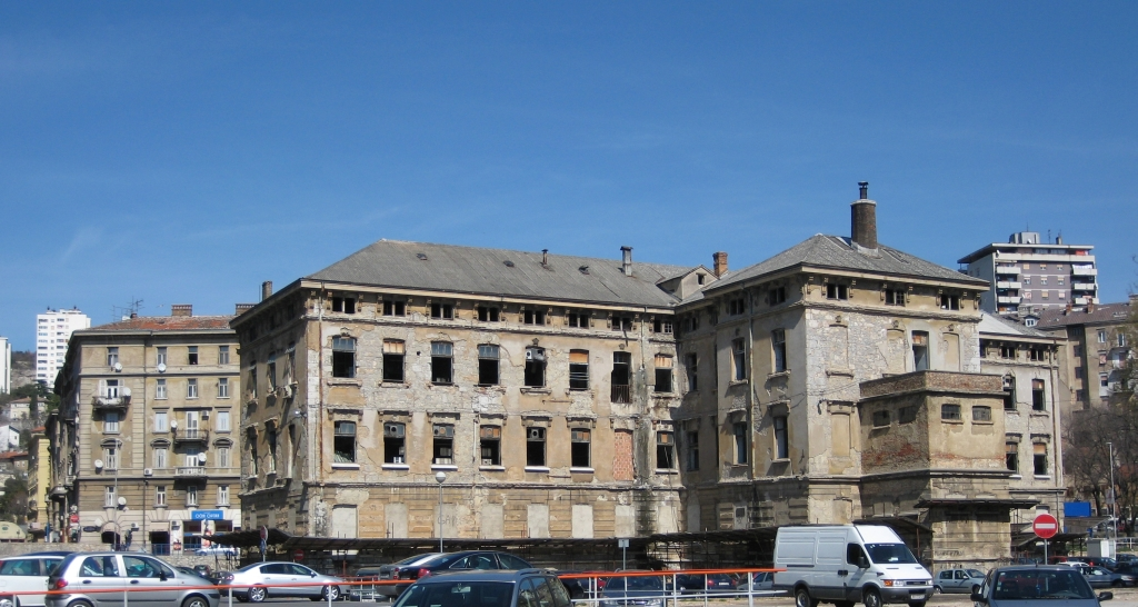 Komplekst bivše tvornice Rikard Benčić u Rijeci.